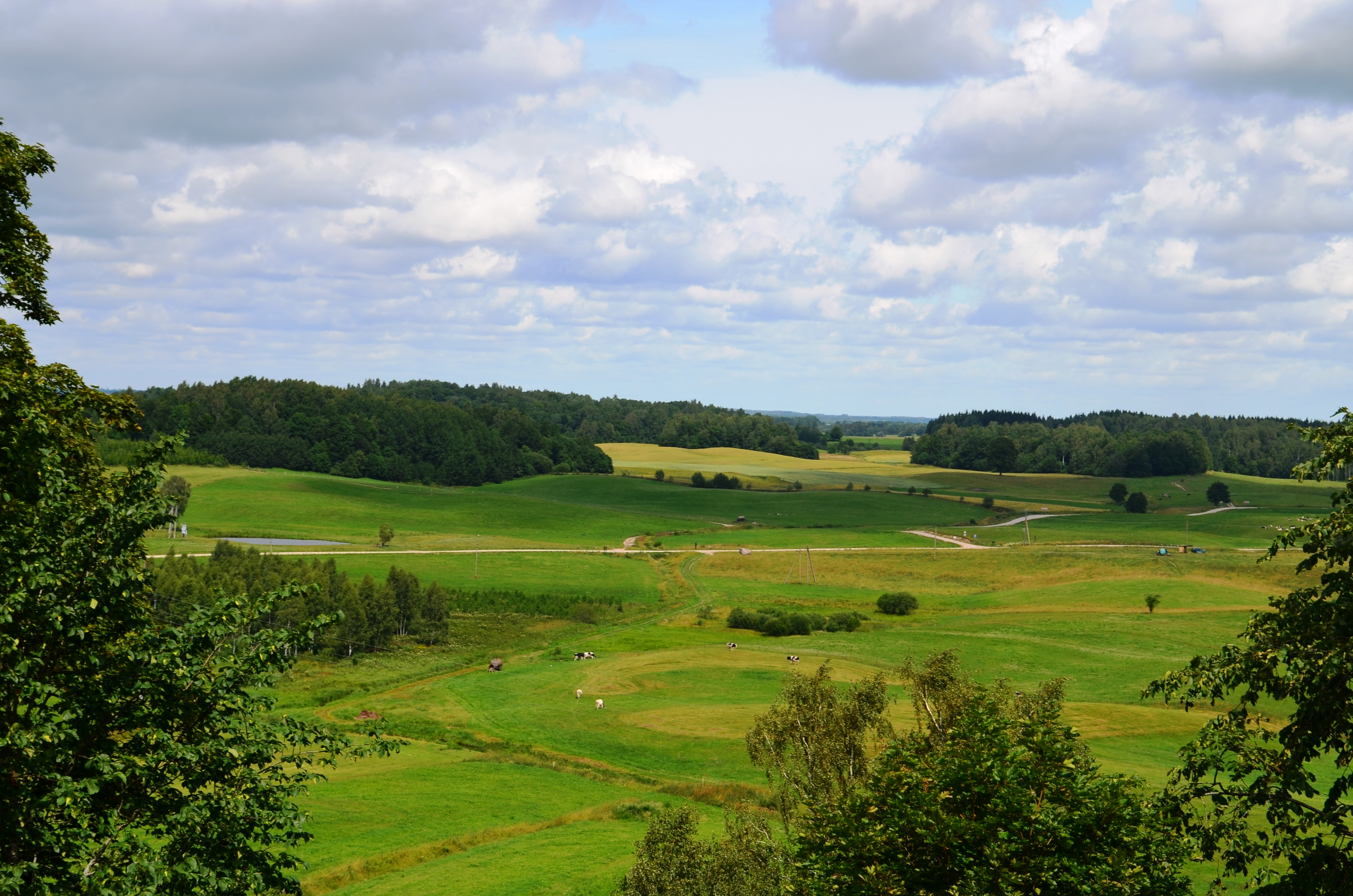 Vaizdas šiaurėn nuo Bilionių piliakalnio, Šilalės r. Žemaitėška: Pavēkslos veizont i šiaurė nuo Bėliuoniu pėliakalnė, Šėlalės raj.